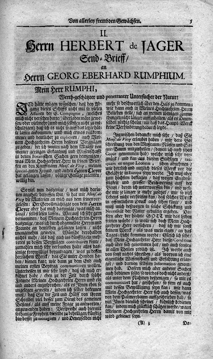 Letter from the orientalist and naturalist Herbert de Jager (1634-1694) to Georg Eberhard Rumpf (1627-1702). Batavia 20 May 1683.